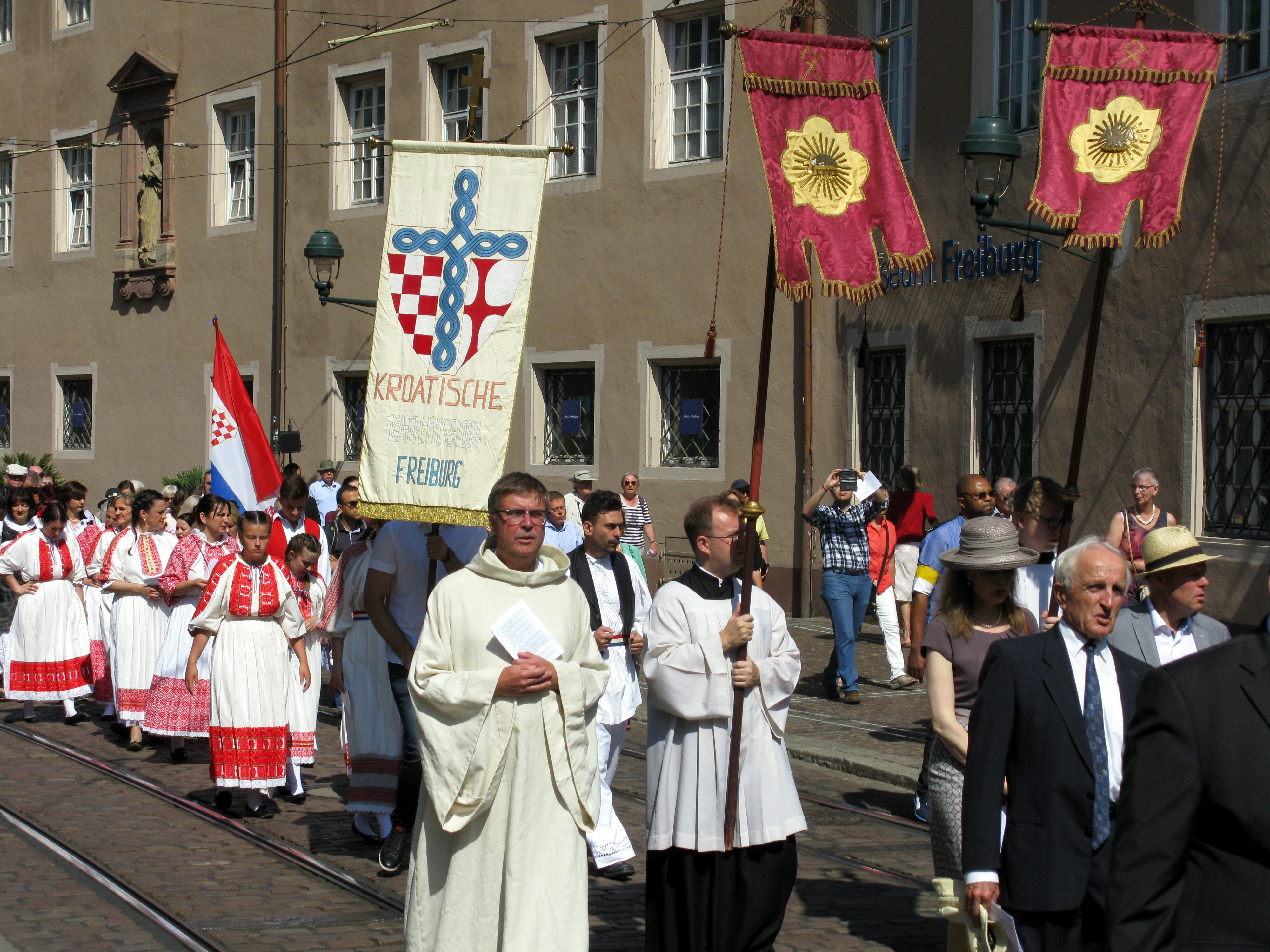 Fronleichnamsprozession in der Freiburger Bertoldstraße, die kroatische kath. Mission Freiburg vor der Alten Uni